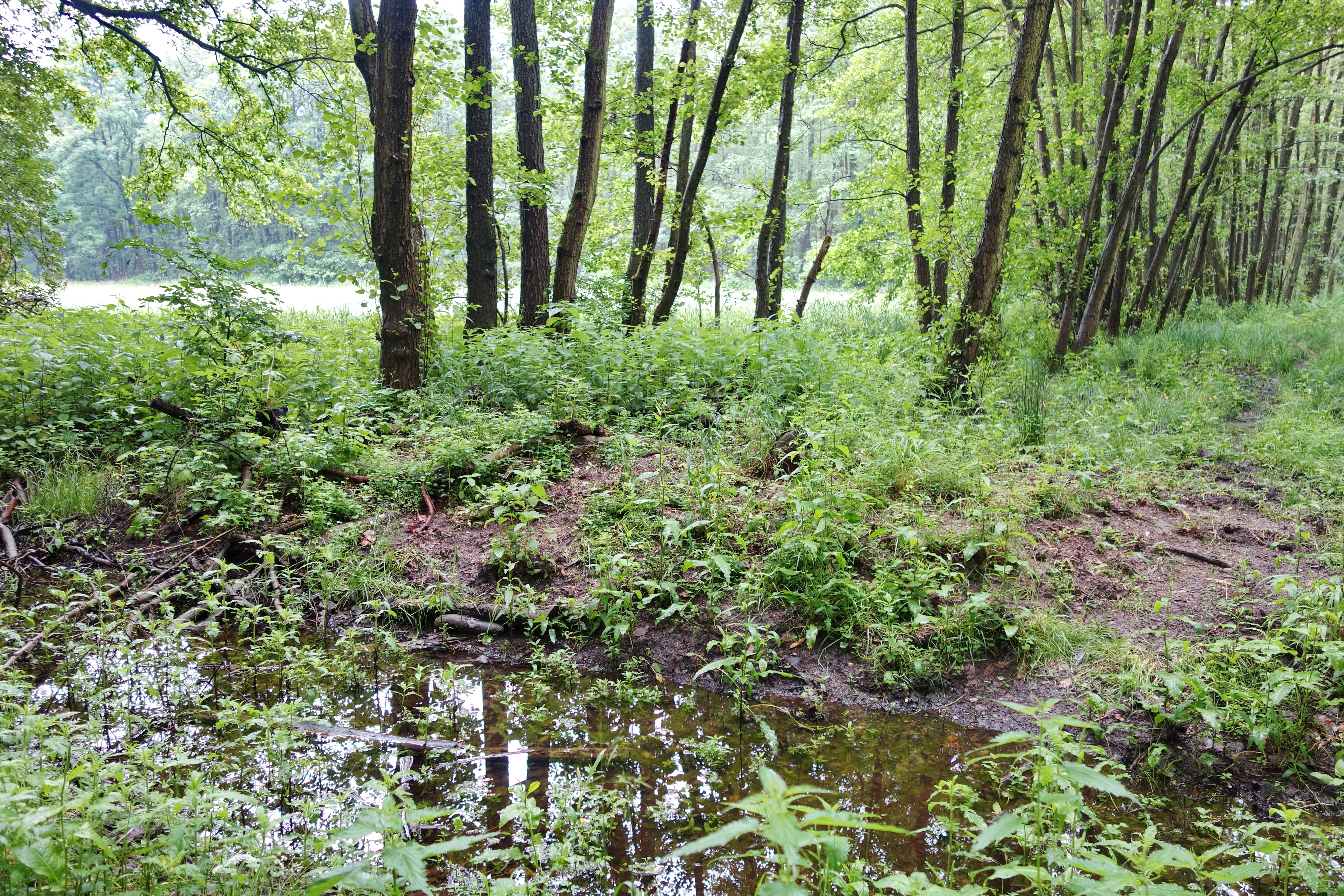 Wasserlache im NSG Luderbachaue von Dreieich